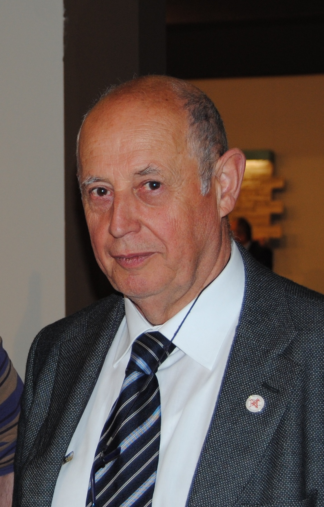 Il professore Franco Laner al Salone del Restauro di Ferrara 2012